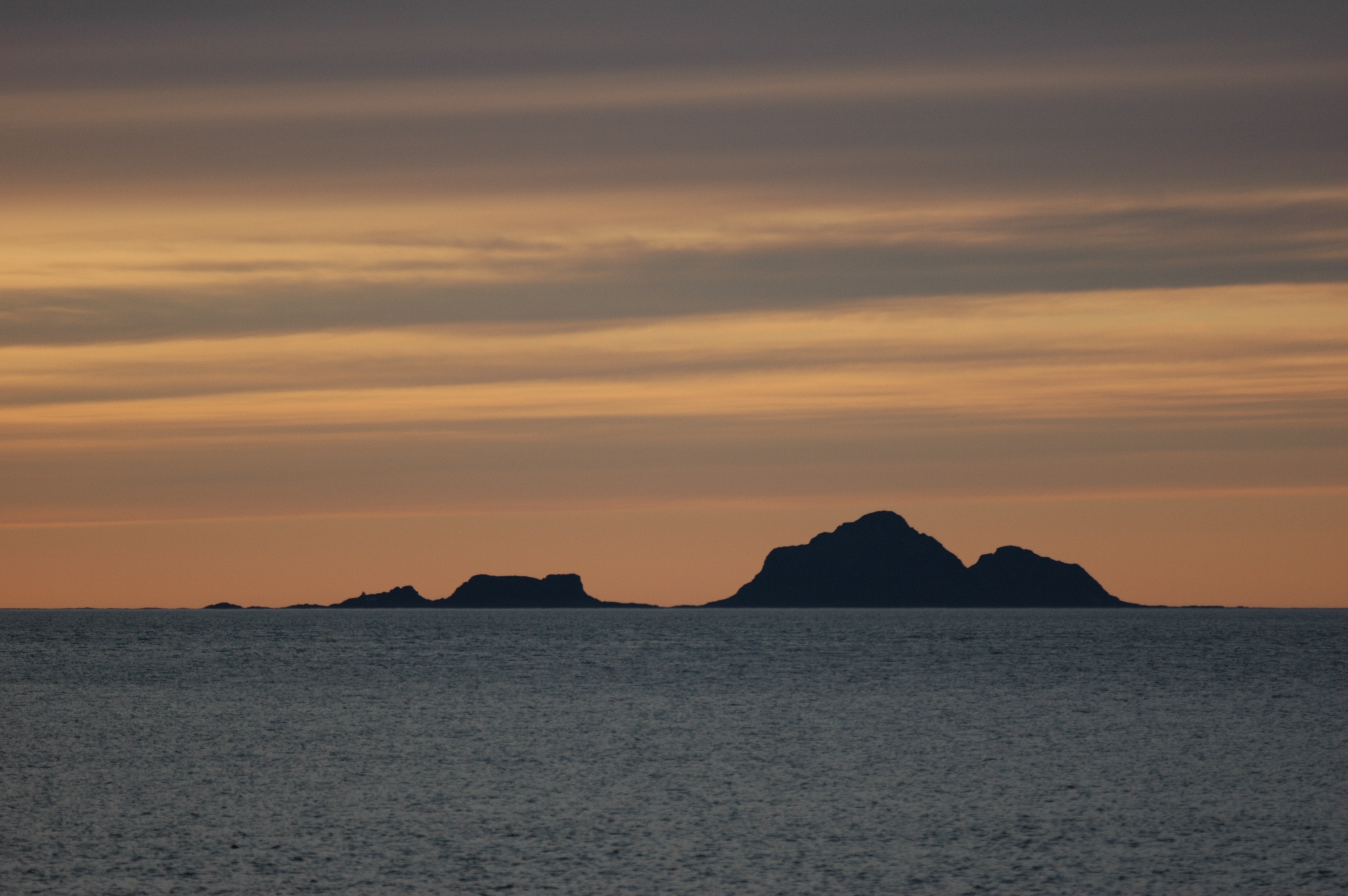 Litløya (left) and Gaukværøya seen from Lofoten